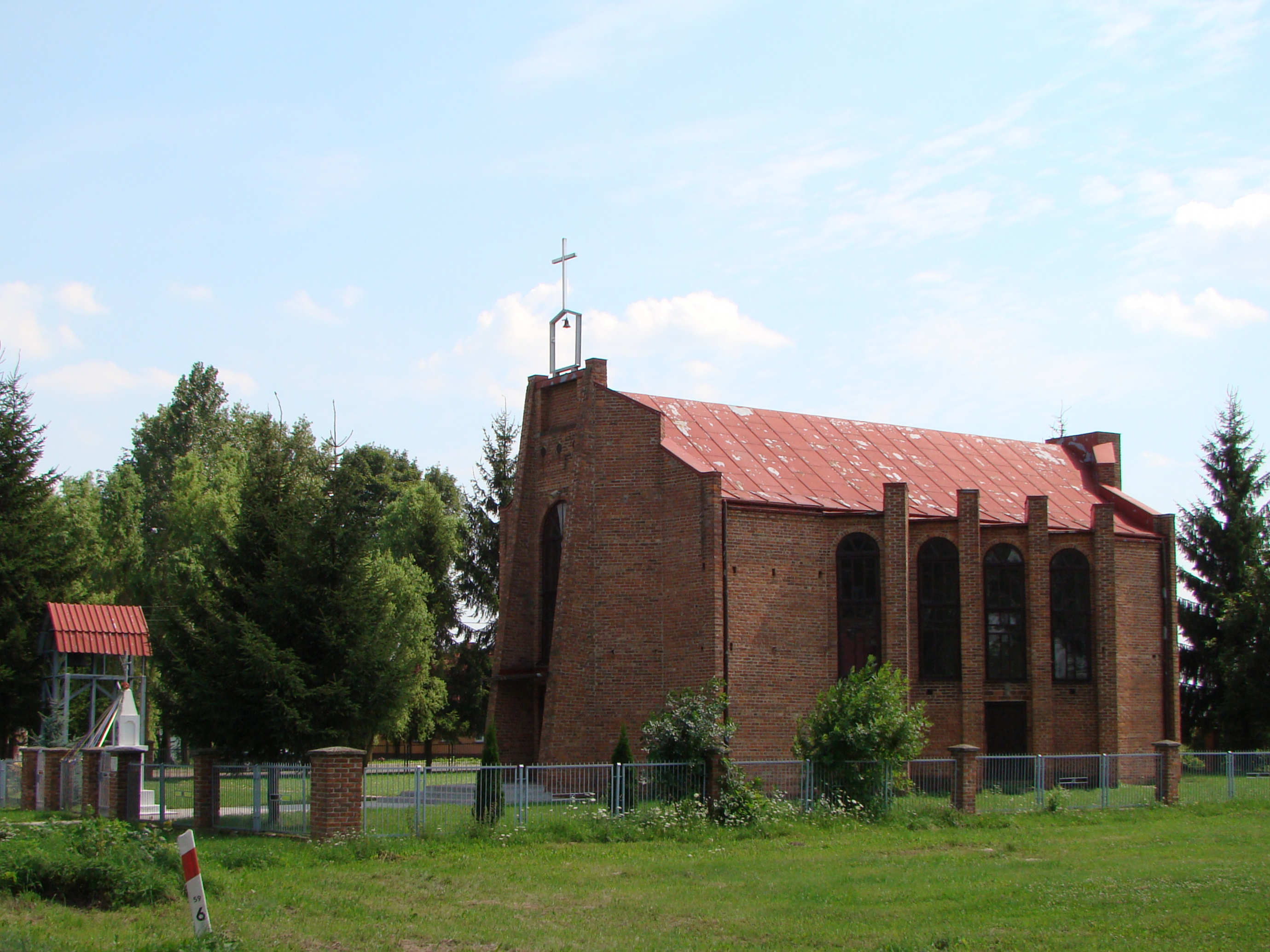 Kostel ve vesnici Bortatycze, Polsko